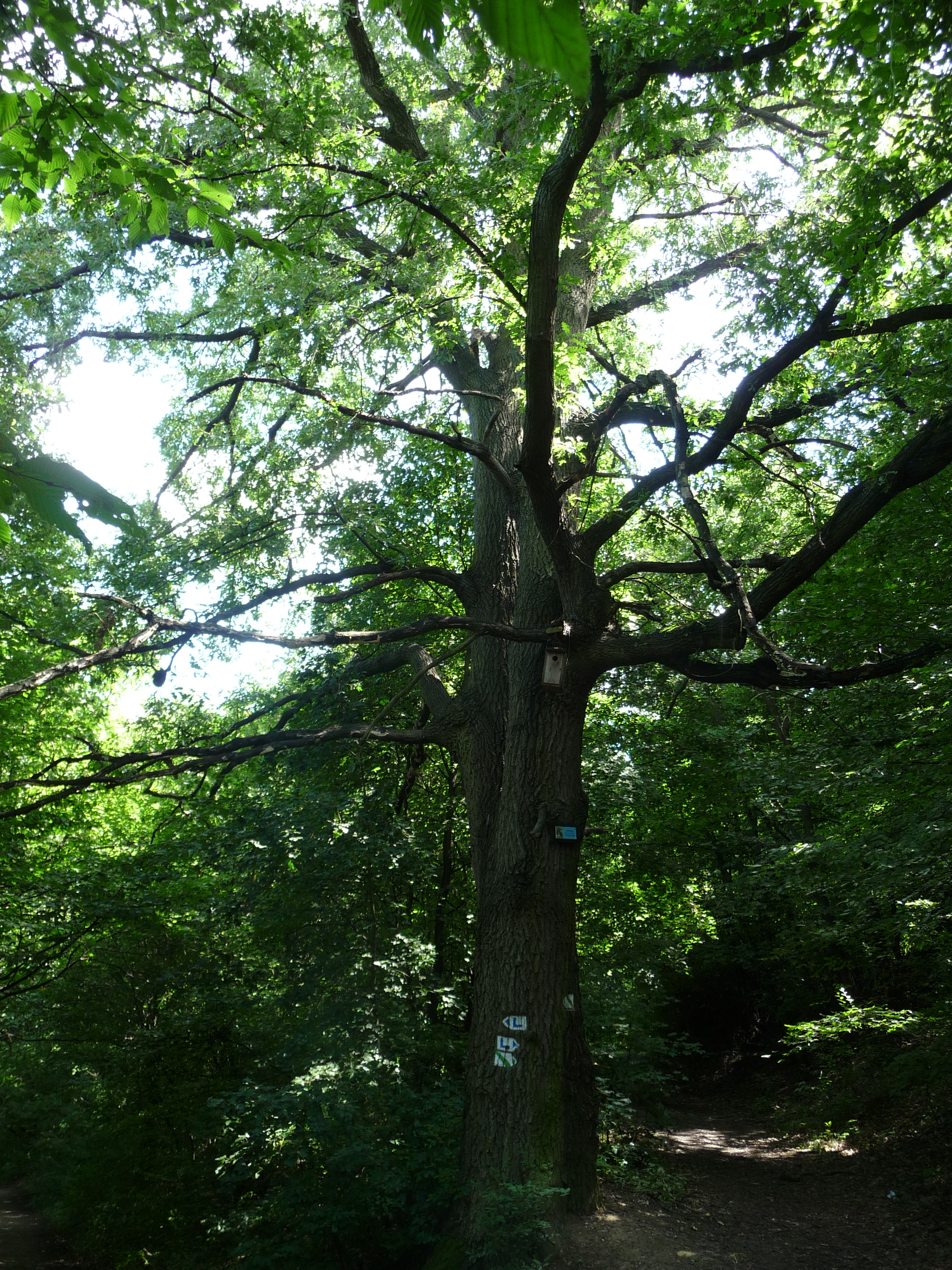 Hollókő, Csertölgy „(Quercus cerris)”